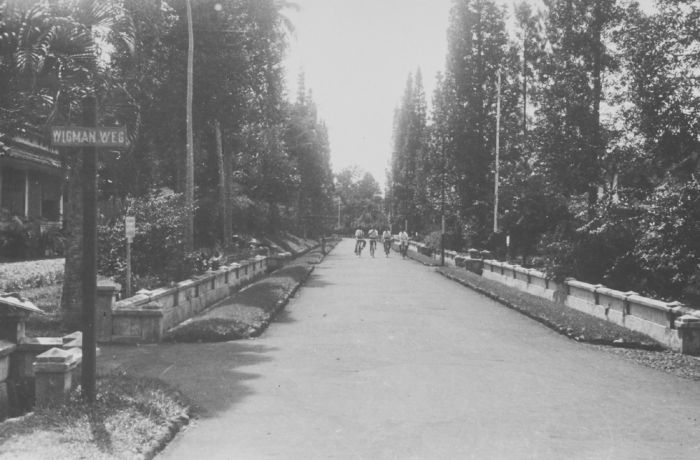 foto. Vier fietsers op de Wigmanweg in de wijk Kota Paris, Buitenzorg